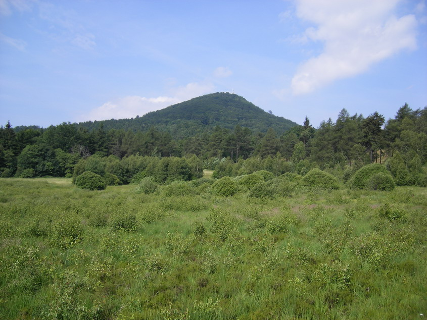 Rašeliniště Brazilka, vpozadí hora Luž